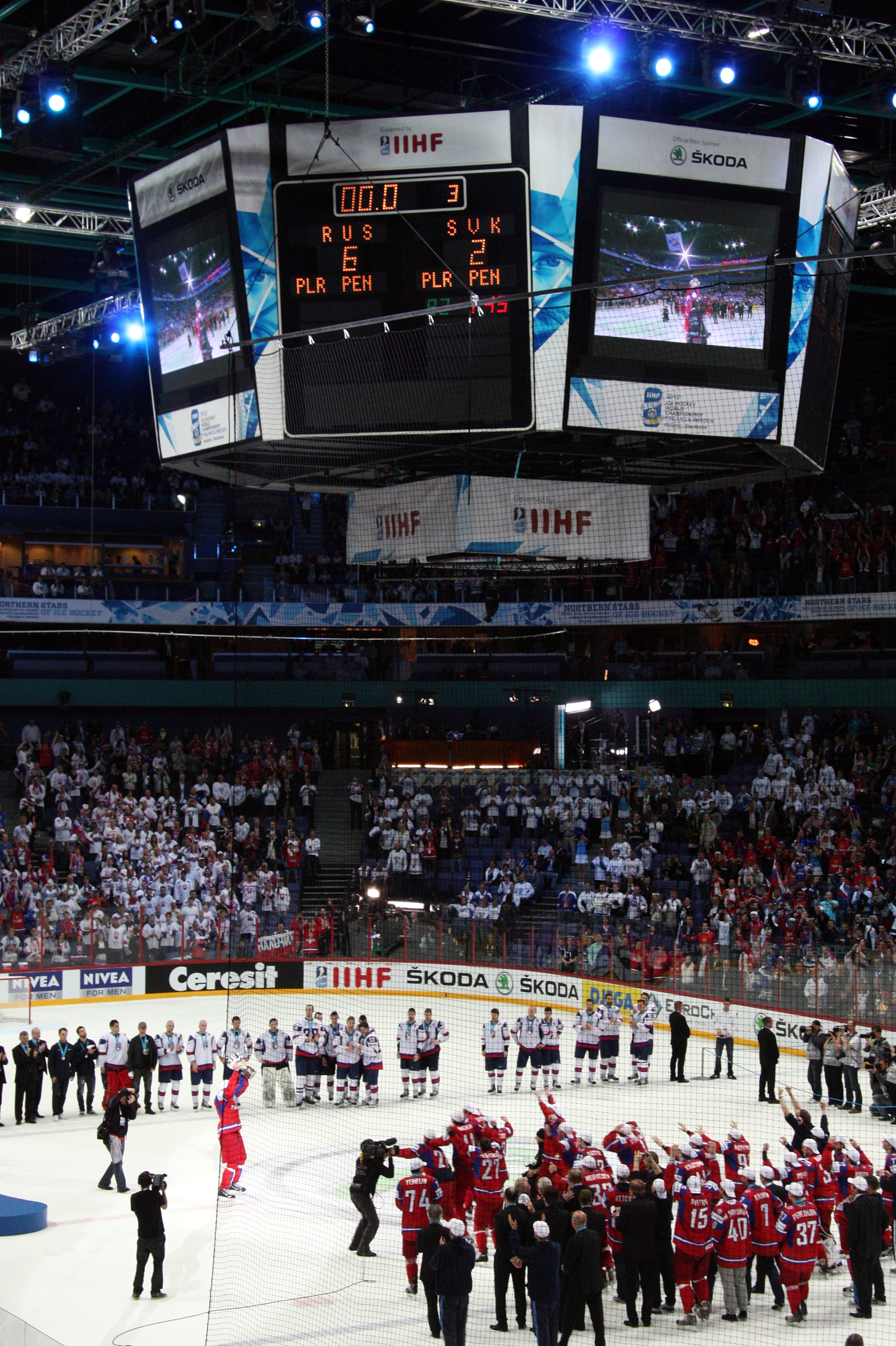 Сборная России по хоккею с Кубком чемпионов мира. 20.05.2012, Хартвалл-Арена, Хельсинки, Финляндия.